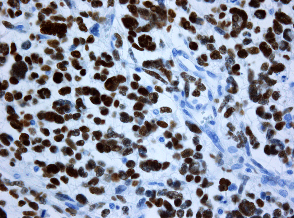 Immunhistochemische Färbung der Tumorzellen für p53. Ansammlung von (defektem) p53-Protein in den Tumorzellkernen bei einem sekundären Glioblastom mit Mutation des TP53 Gens.